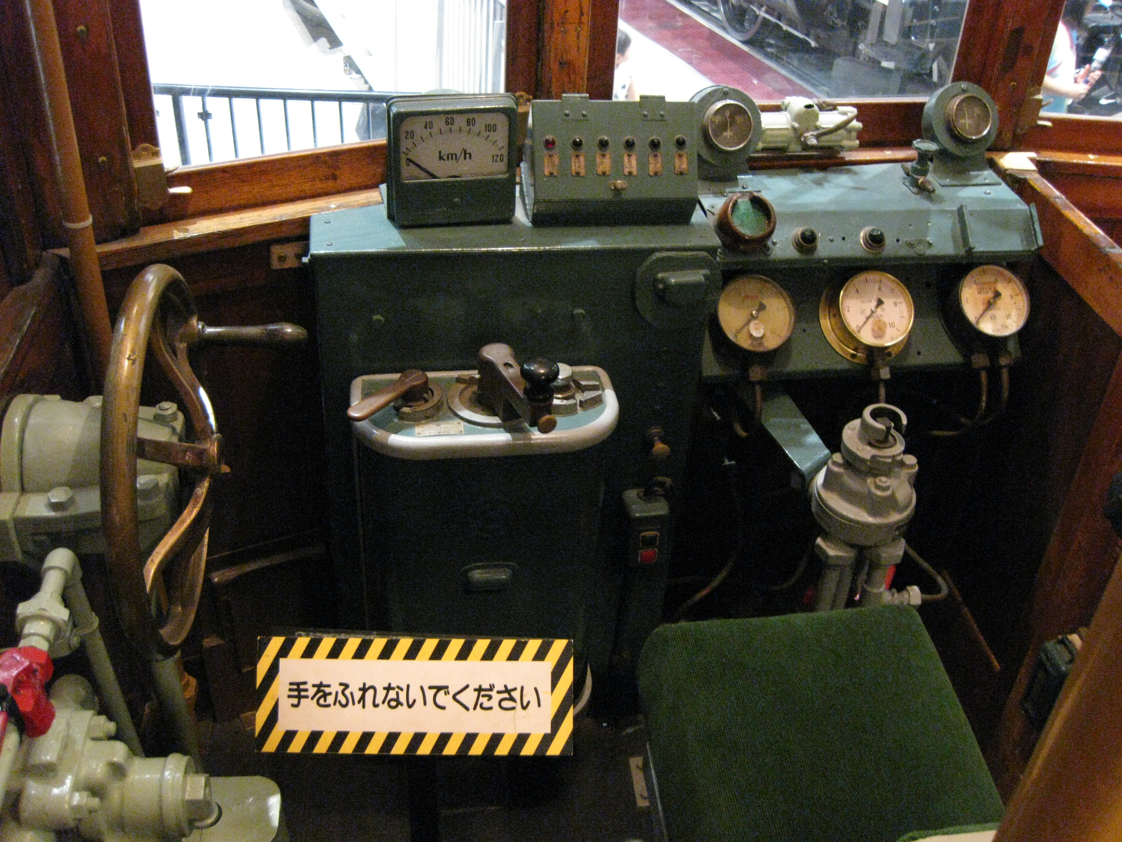 鉄道博物館に展示されているキハ41000の運転台